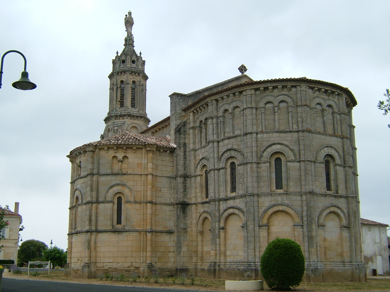 Bayon, en Gironde (France). Eglise prise du sud-est. Abside romane, chapelle du transept et superstructure du clocher du XIX° siècle.